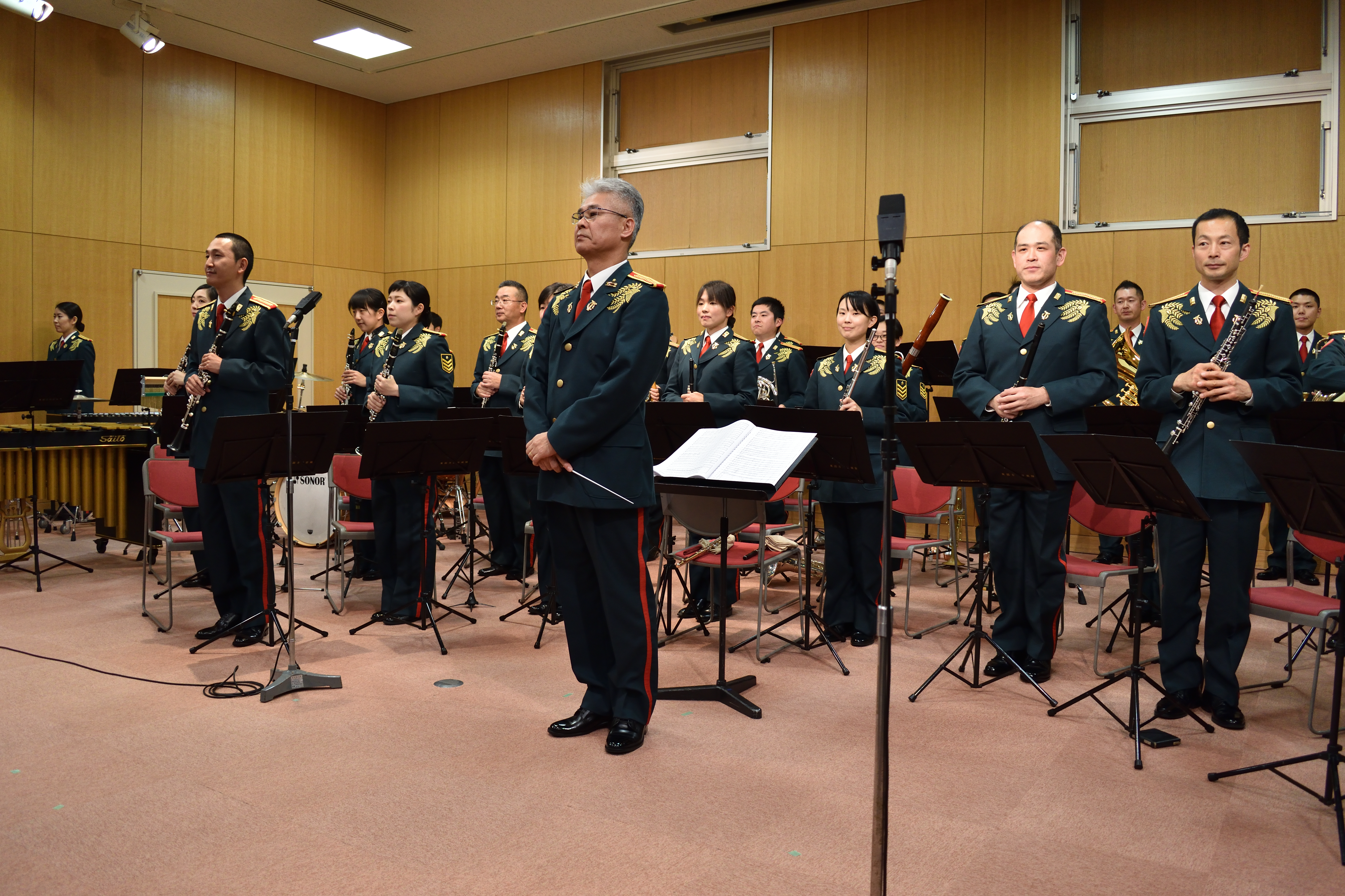 陸上自衛隊広報センターで演奏する陸上自衛隊東部方面音楽隊。